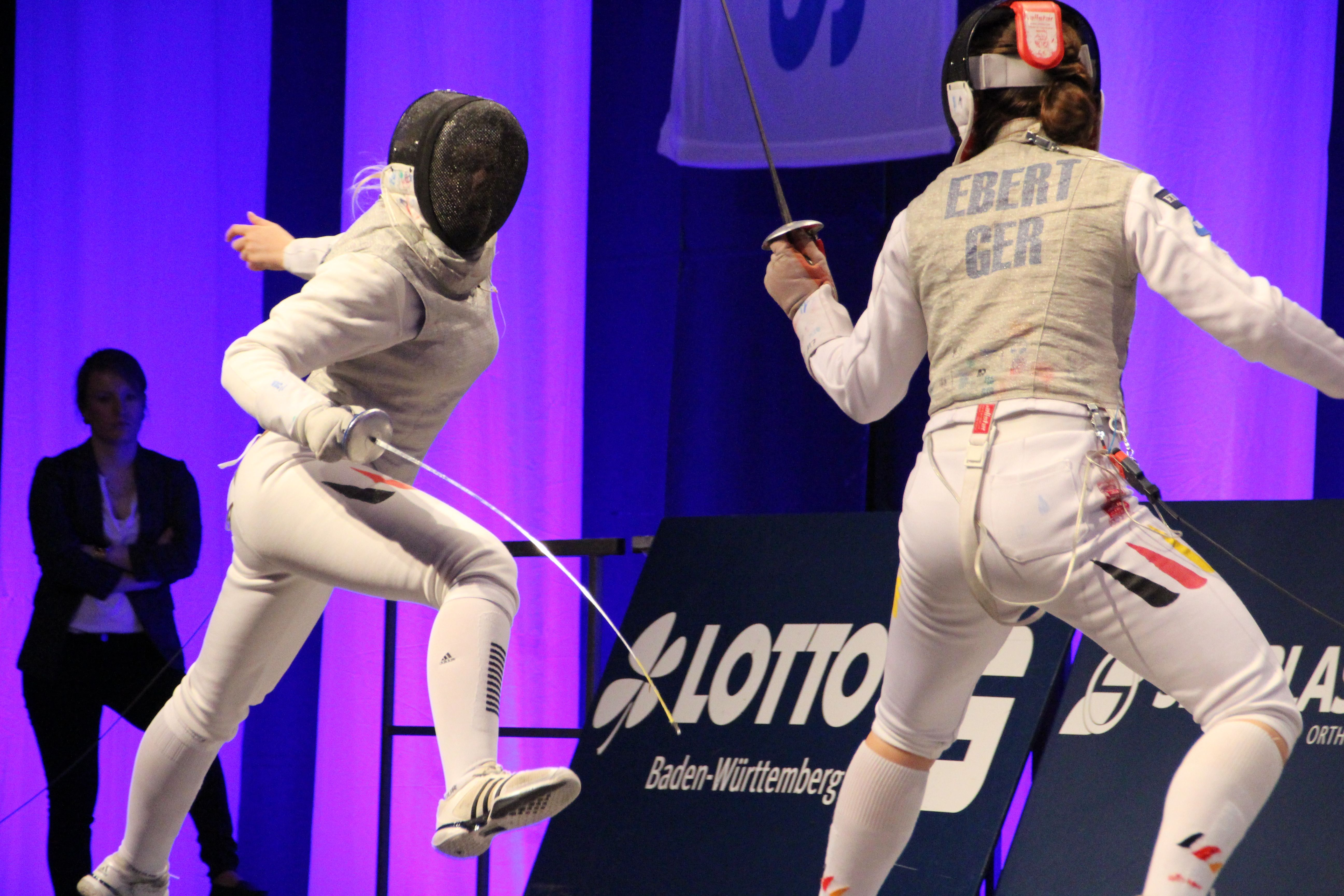 DeuDeutsche Fechtmeisterschaften 2017 im Florett vom 25. bis 26. März 2017 im Olympiastützpunkt Tauberbischofsheim beim Fecht-Club Tauberbischofsheim